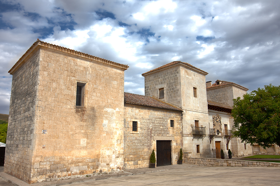 Palacio de los Fernández-Zorrilla ubicado en la villa de Huermeces, Burgos, declarada conjunto histórico por Patrimonio Cultural de Castilla y León